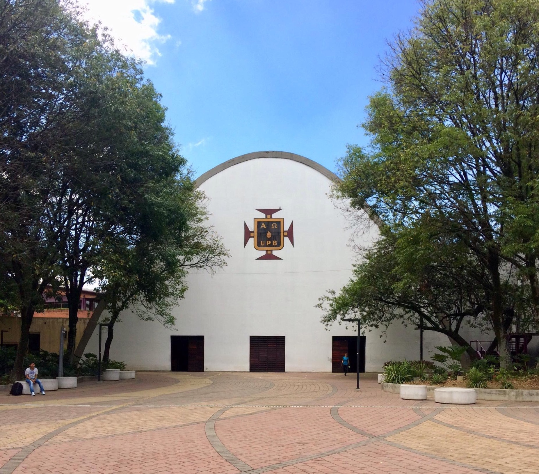 Templo Universitario "Nuestra Señora del Santísimo Sacramento", frente a la Plaza de los Fundadores. Universidad Pontificia Bolivariana, Medellín.